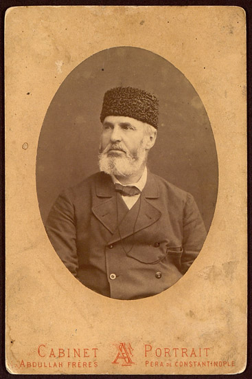 Портретна снимка на Александър Богориди.